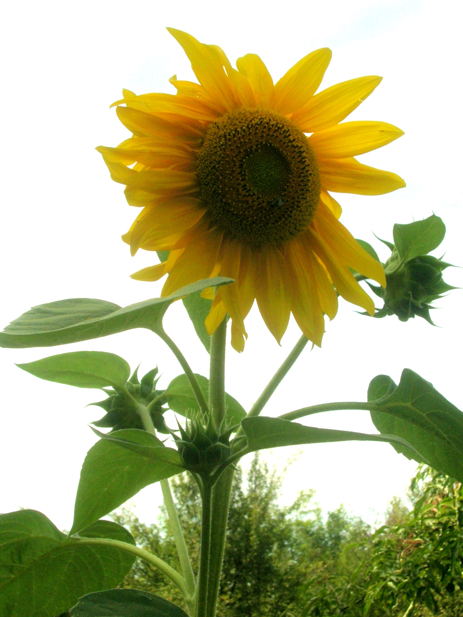 Girasol - Nyíregyháza (Hungary)